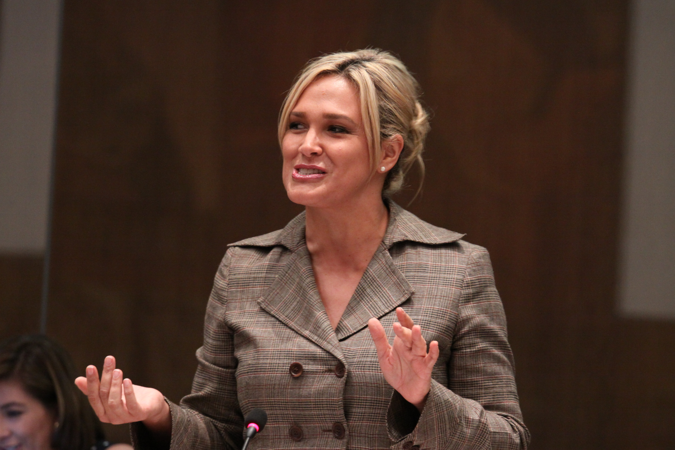 10 de Marzo de 2010